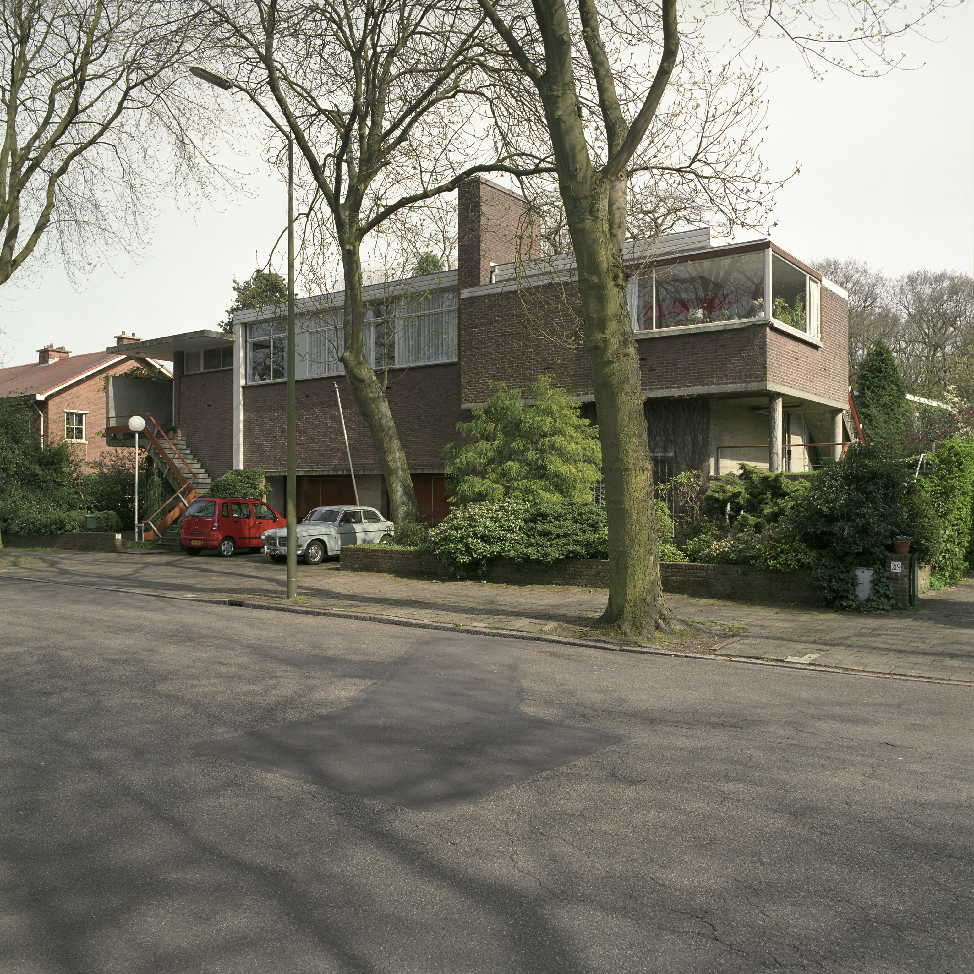 Bunkerhuis: Overzicht van de voorgevel, gezien vanaf de straat (opmerking: Gefotografeerd voor Monumenten van Herrezen Nederland)